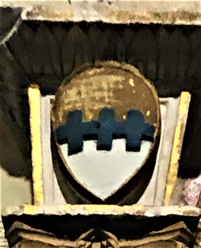 Cappella Cartolari nella Cattedrale di Verona